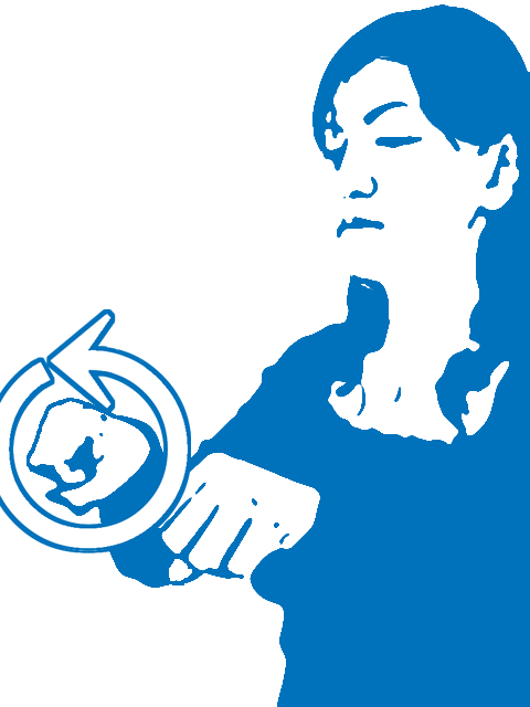 日本手話の「バイク」2007.Apr.2-yokohama.b